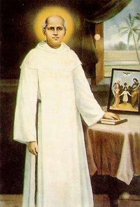 Der Selige Kuriakose Elias Chavara